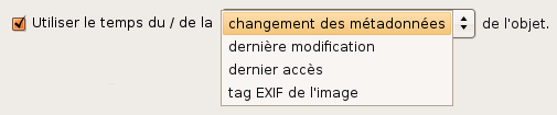 Exemple d'une liste déroulante sous GNOME